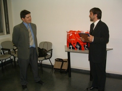 Entrega del Soci d'Honor 2003, a Jordi Roig de Zarate, exdirector de l'Escola Universitària de Informàtica de Sabadell, durant el període 2000-2002.